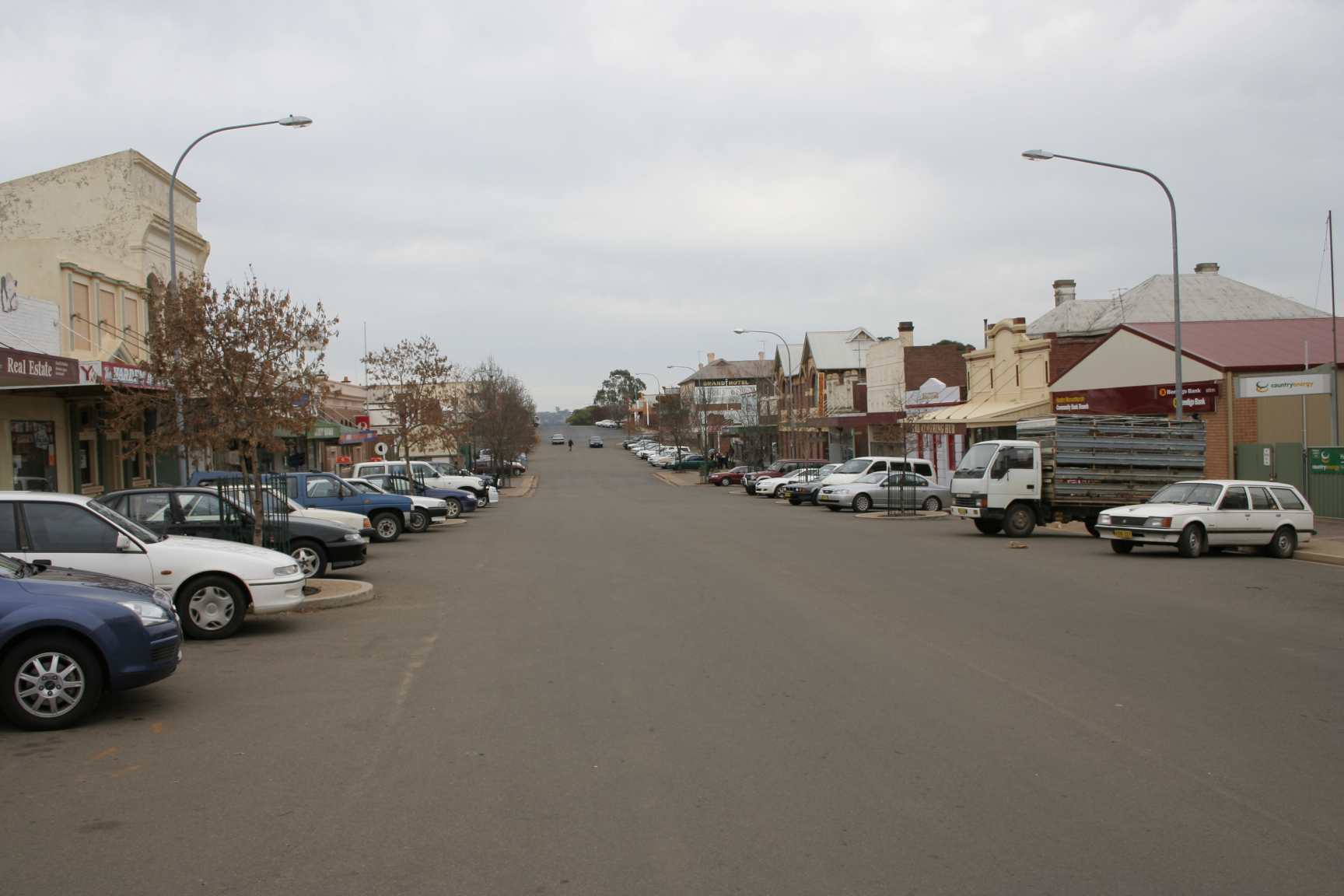 Harden main street